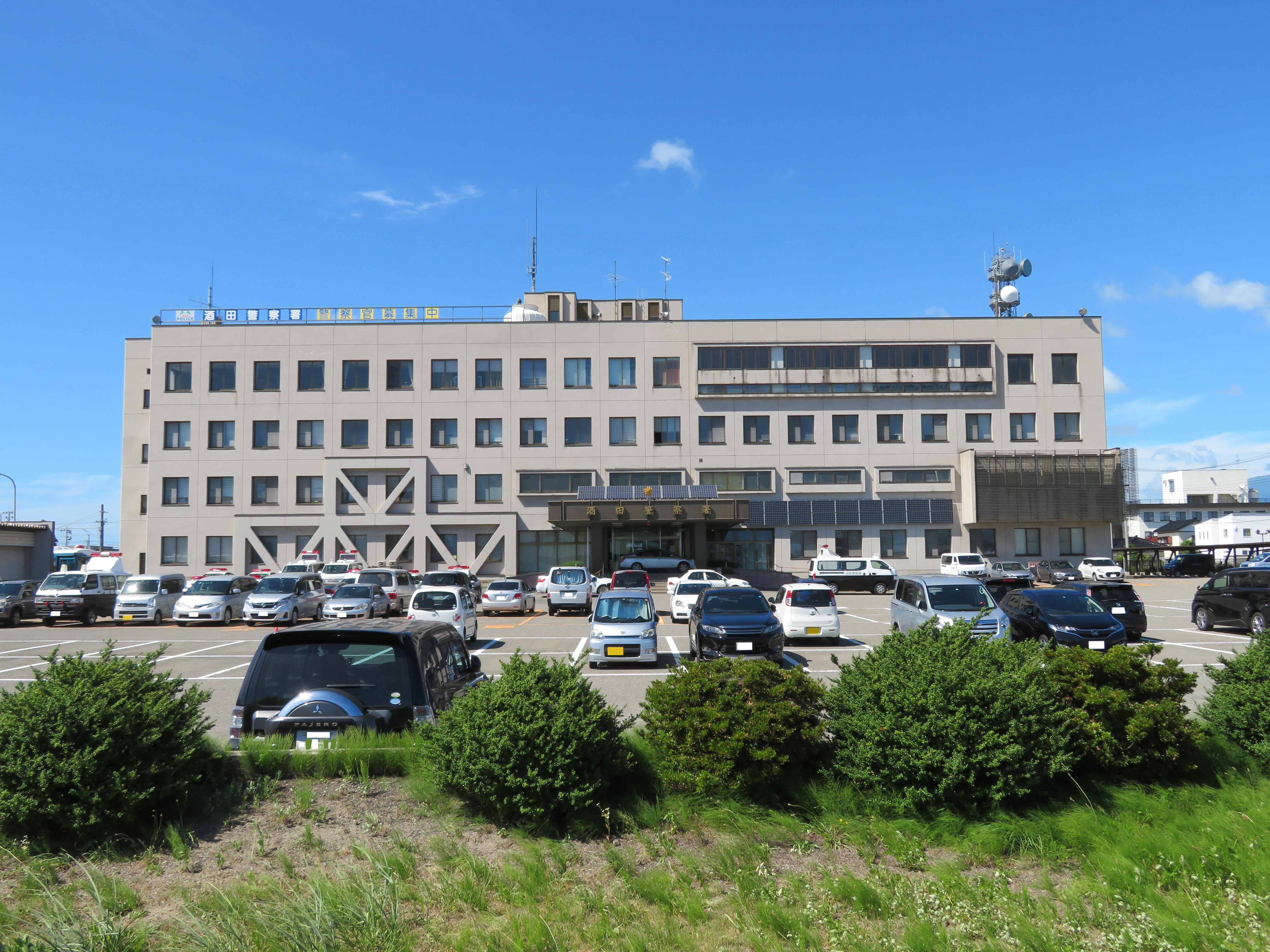 山形県警察酒田警察署庁舎 Canon PowerShot SX720 HS